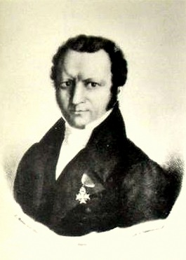 Porträt Charles Le Hon, belgischer Minister